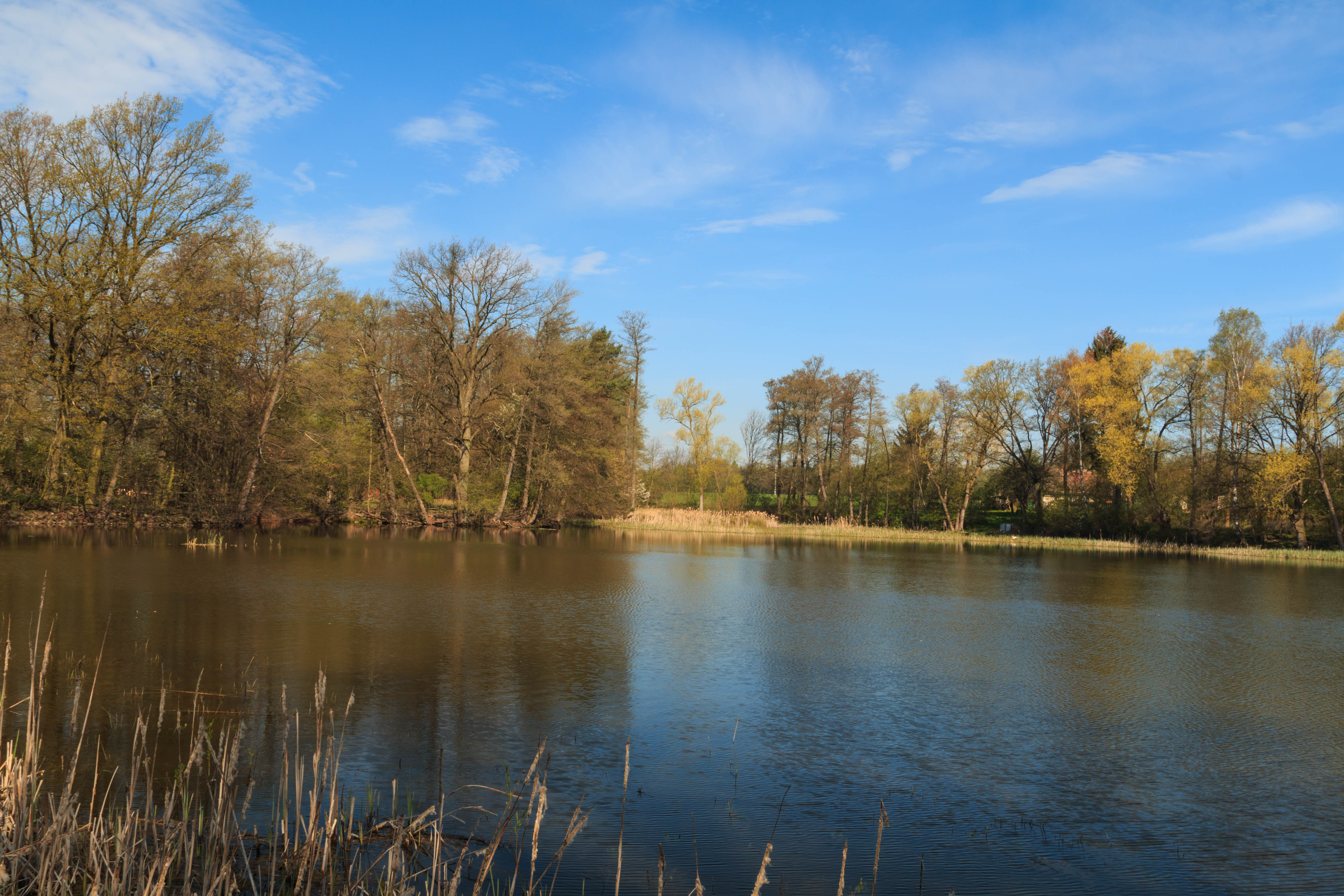 Přírodní památka Rybník Moře Project: Chráněná území.